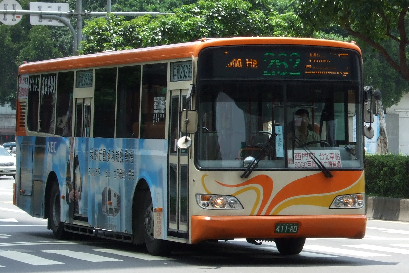 MTCBus route 262HR